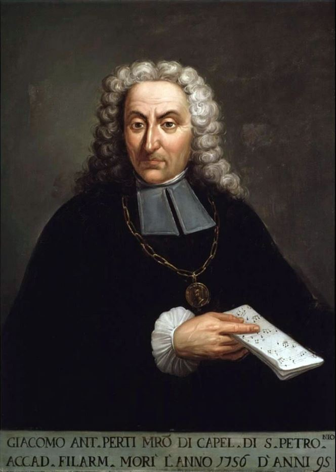 Portrait of Giacomo Antonio Perti (1661-1756), Italian composer